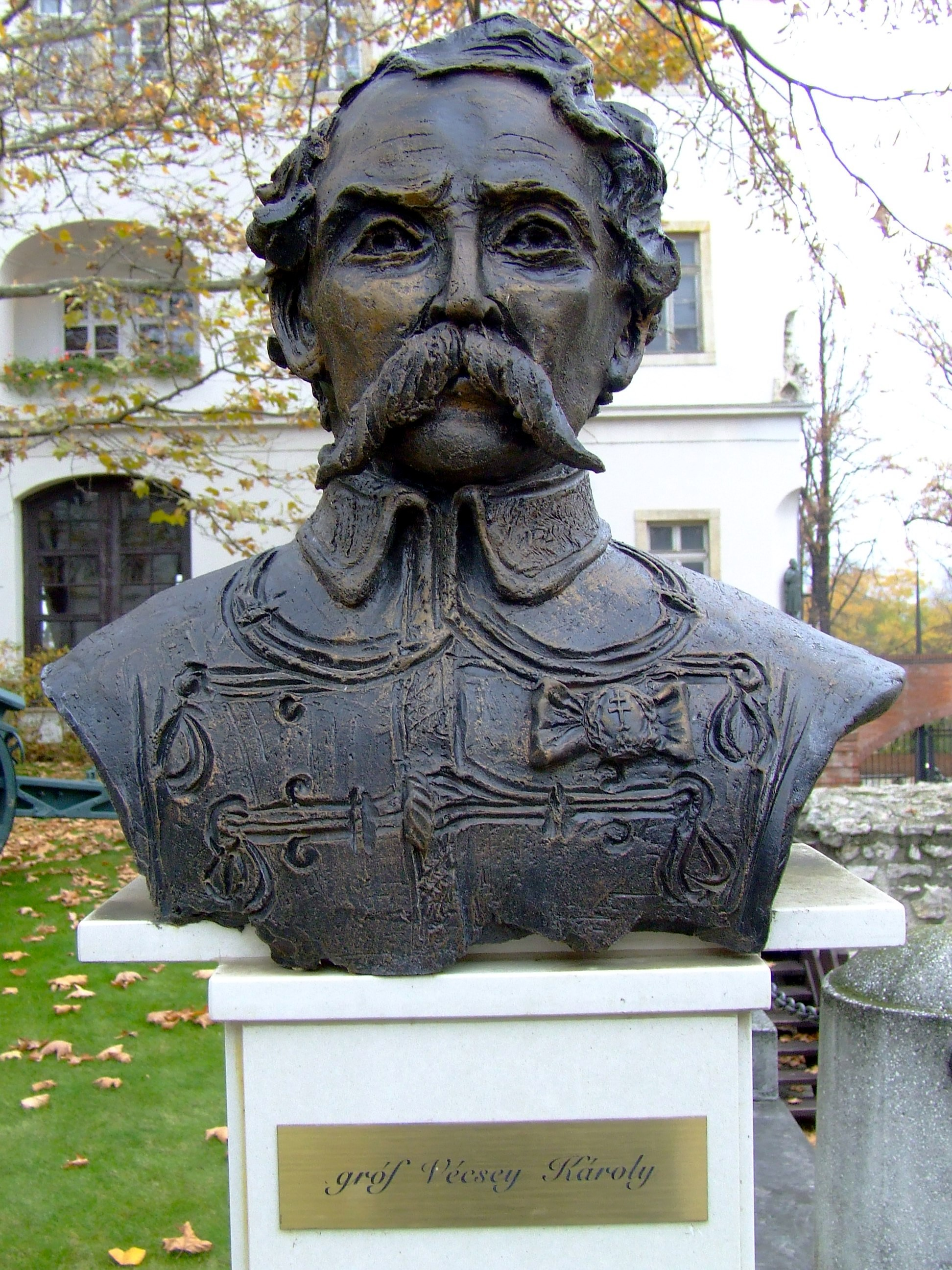 Vécsey Károly (1803–1849) honvéd vezérőrnagy szobra a budapesti Hadtörténeti Intézet és Múzeum udvarán